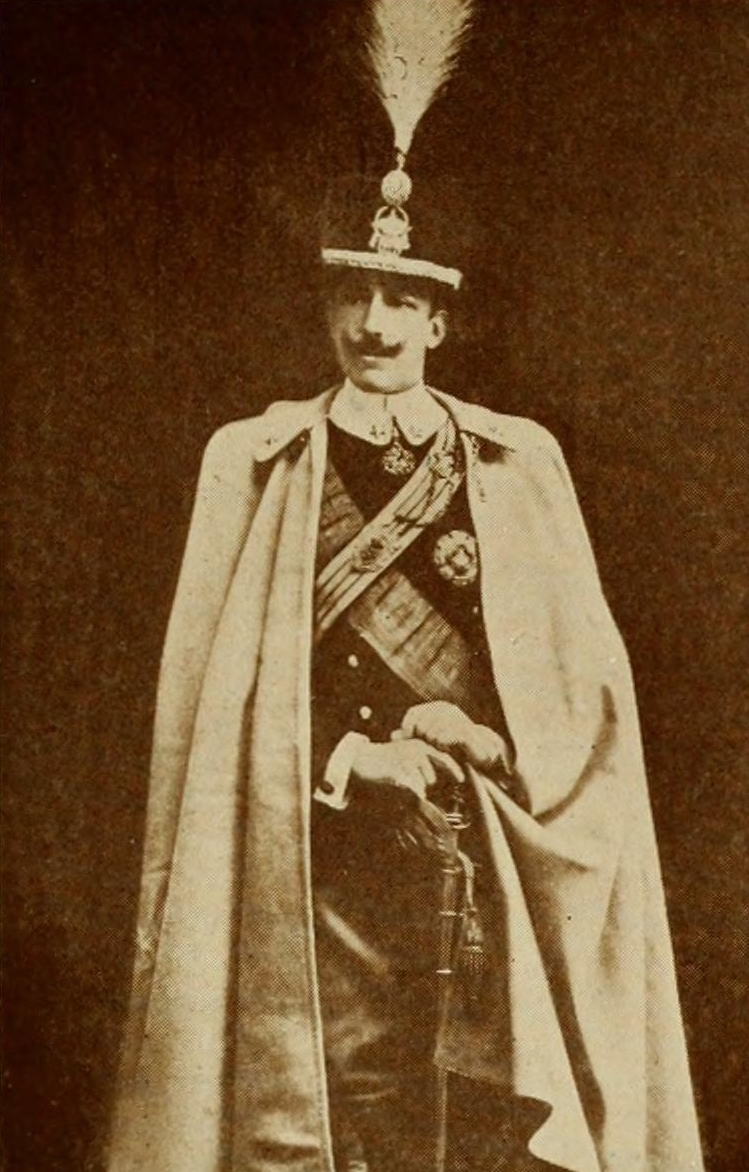 Illustration aus " Italian castles and coutry seats "